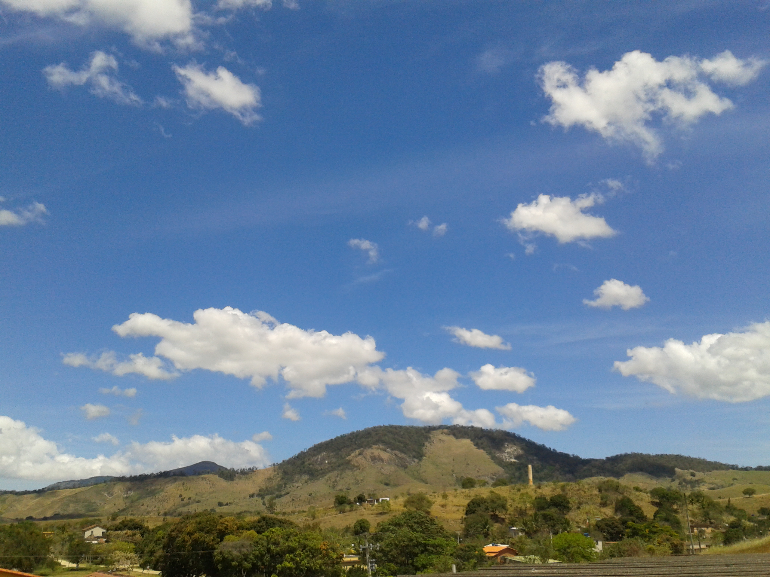 Serra do Lagarto - detalhe